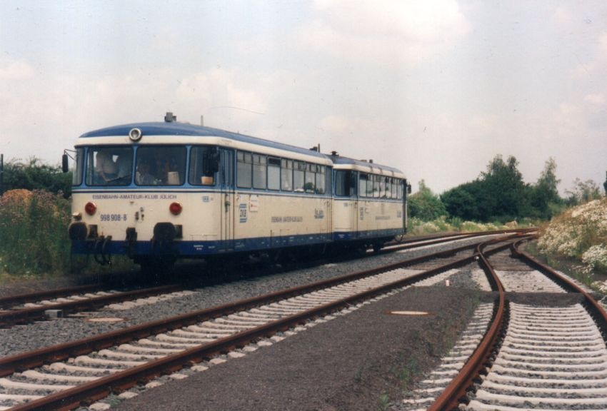 Die Schienenbusse des Eisenbahn-Amateur-Klub Jülich (EAKJ) am 6. Juli 1997 im Bahnhof Distelrath der Dürener Kreisbahn (DKB)